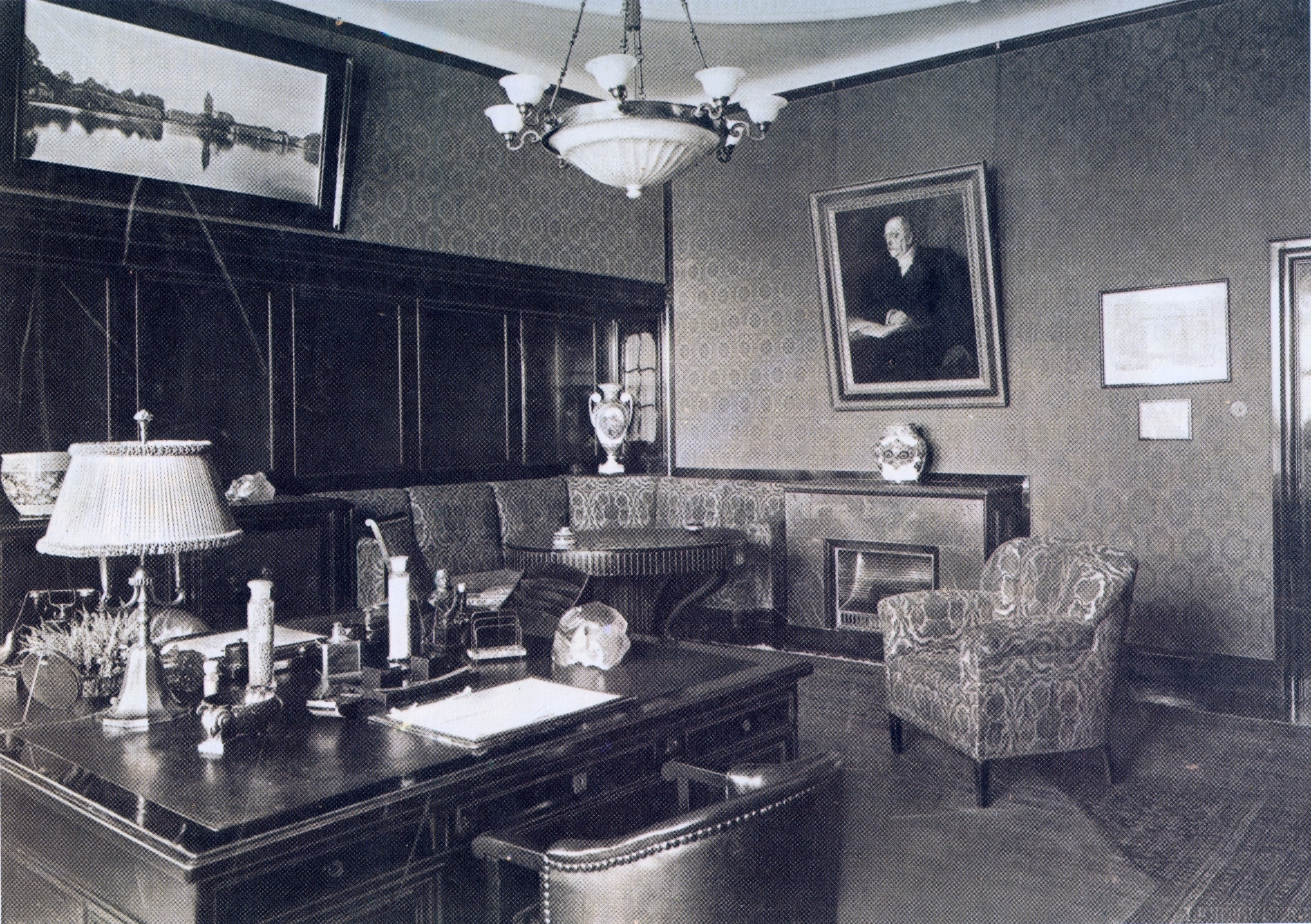 Arbeitszimmer von Friedrich ("Fritz") Karl Henkel in der Heinestraße 11, Düsseldorf, Deutschland.